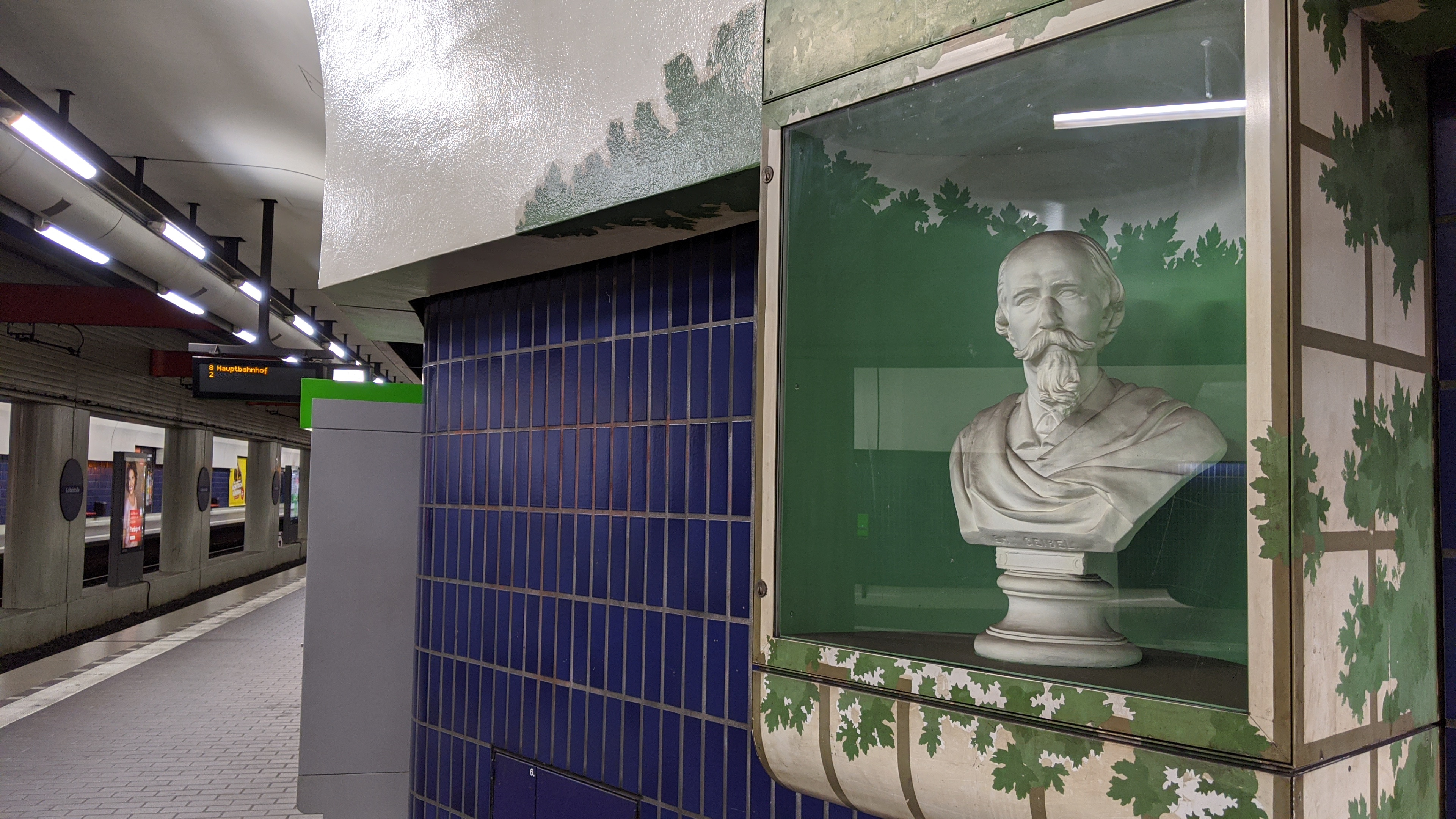 Stadtbahn Hannover, U-Bahnhof Geibelstraße, Büste von Emanuel Geibel, dem Namensgeber der Straße auf dem Bahnsteig Richtung Norden (stadteinwärts), Taken on 28 June 2020